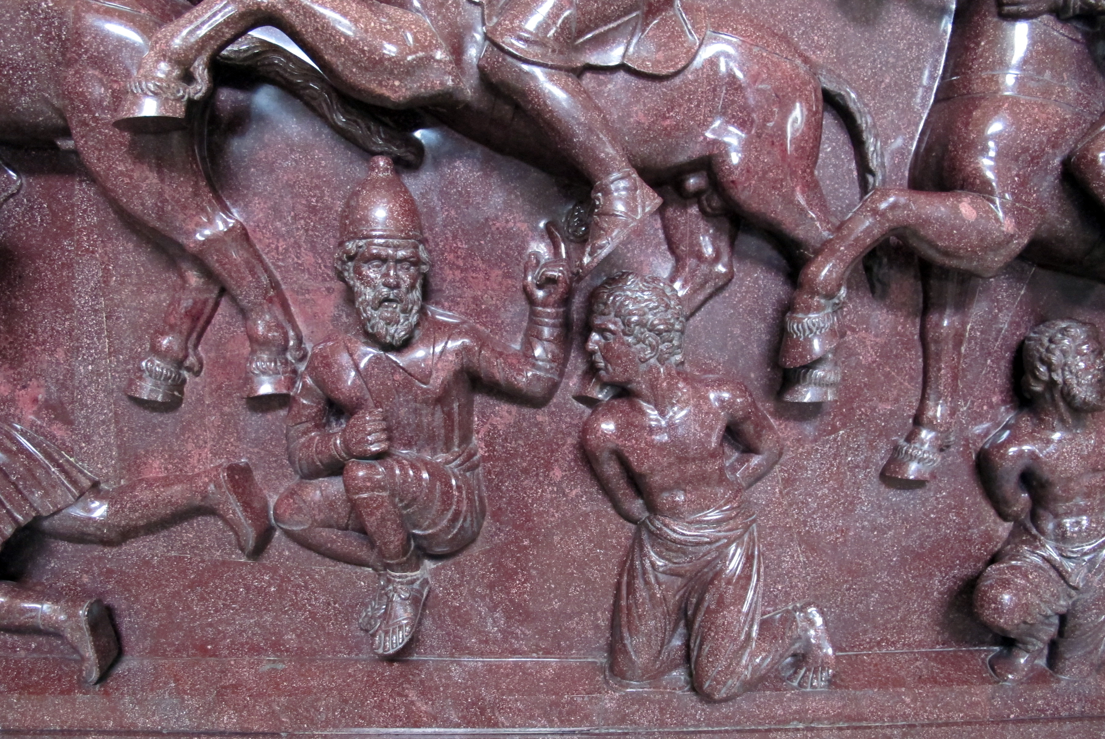 Arte romana nei Musei Vaticani